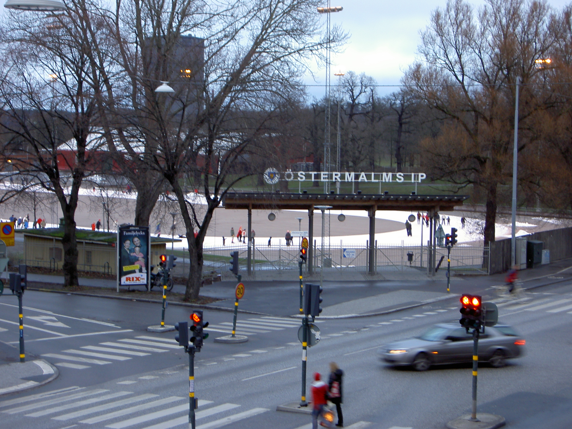 Östermalms IP, Stockholm, Sweden